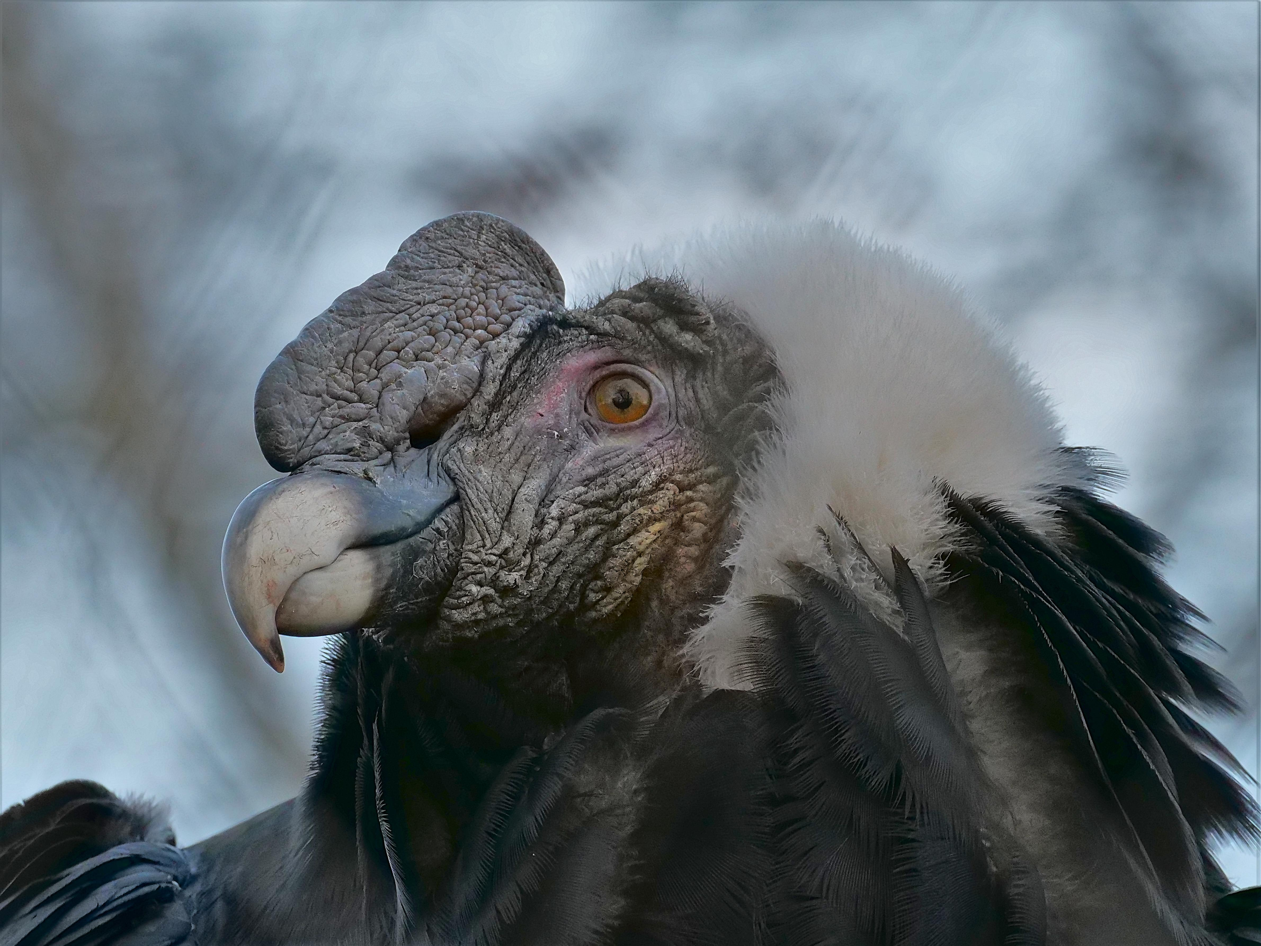 Condor